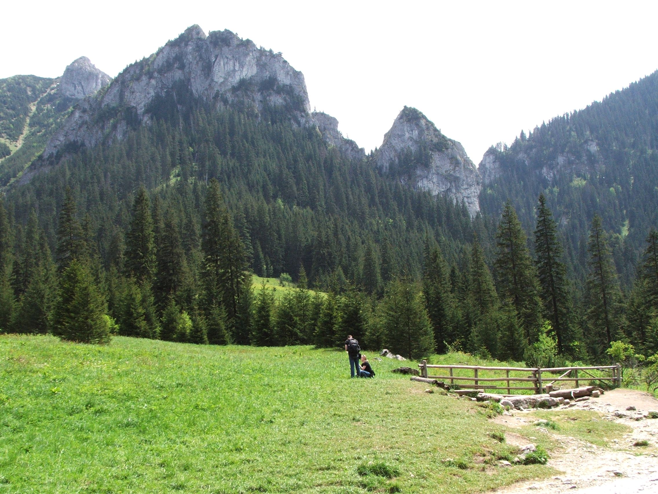 Polana Pisana, Saturn, Ratusz, Upłazkowa Turnia.